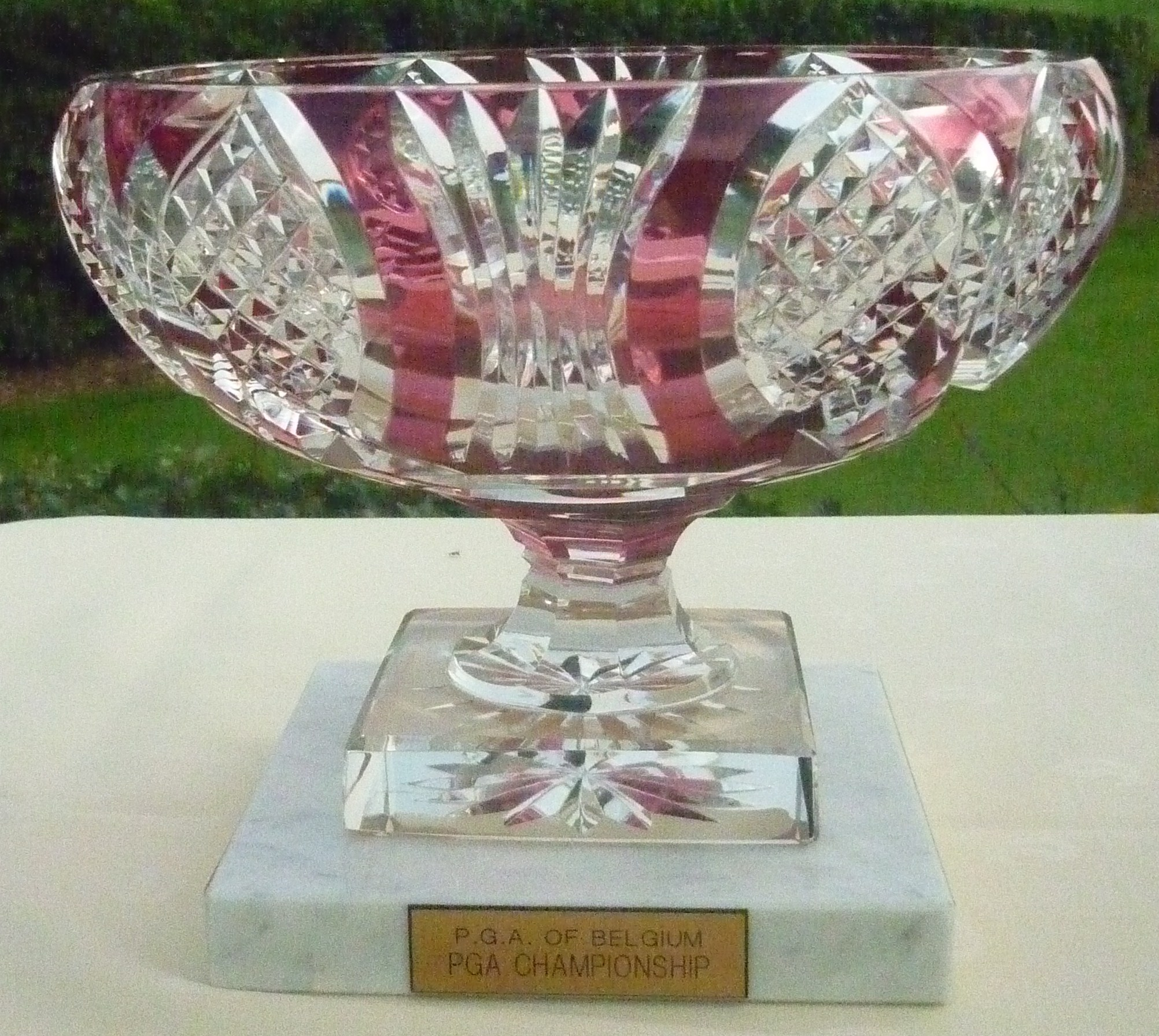 Trofee_Belgisch_PGA_Kampioenschap